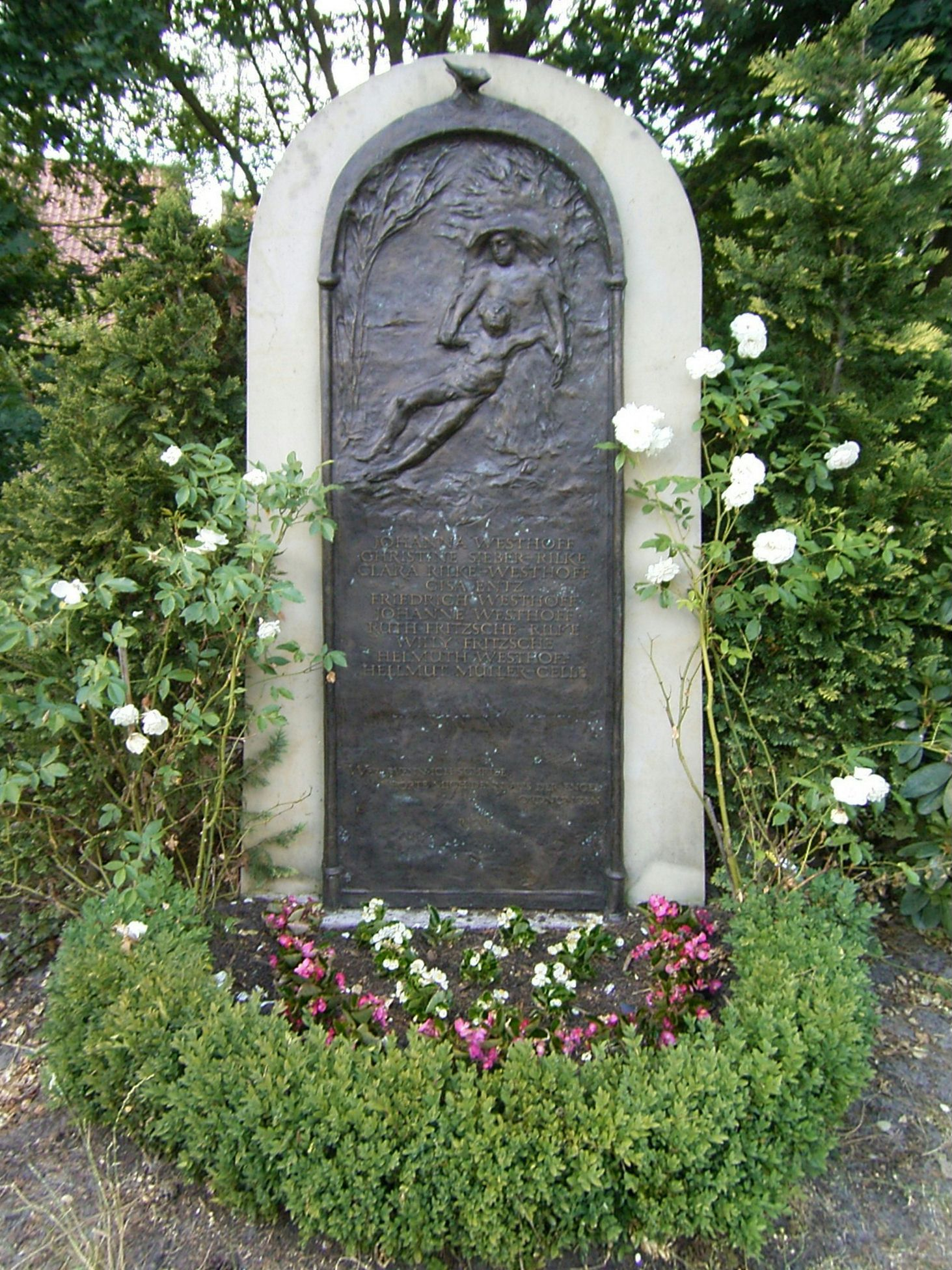 Friedhof Fischerhude, Flecken Ottersberg, Landkreis Verden; Grabstein Familiengrabstelle: Johanna Westhoff, Christine Sieber-Rilke, Clara Rilke-Westhoff, Gisa Entz, Friedrich Westhoff, Johanne Westhoff, Ruth Fritzsche--Rilke, Willy Fritzsche, Helmuth Westhoff, Hellmut Müller-Celle